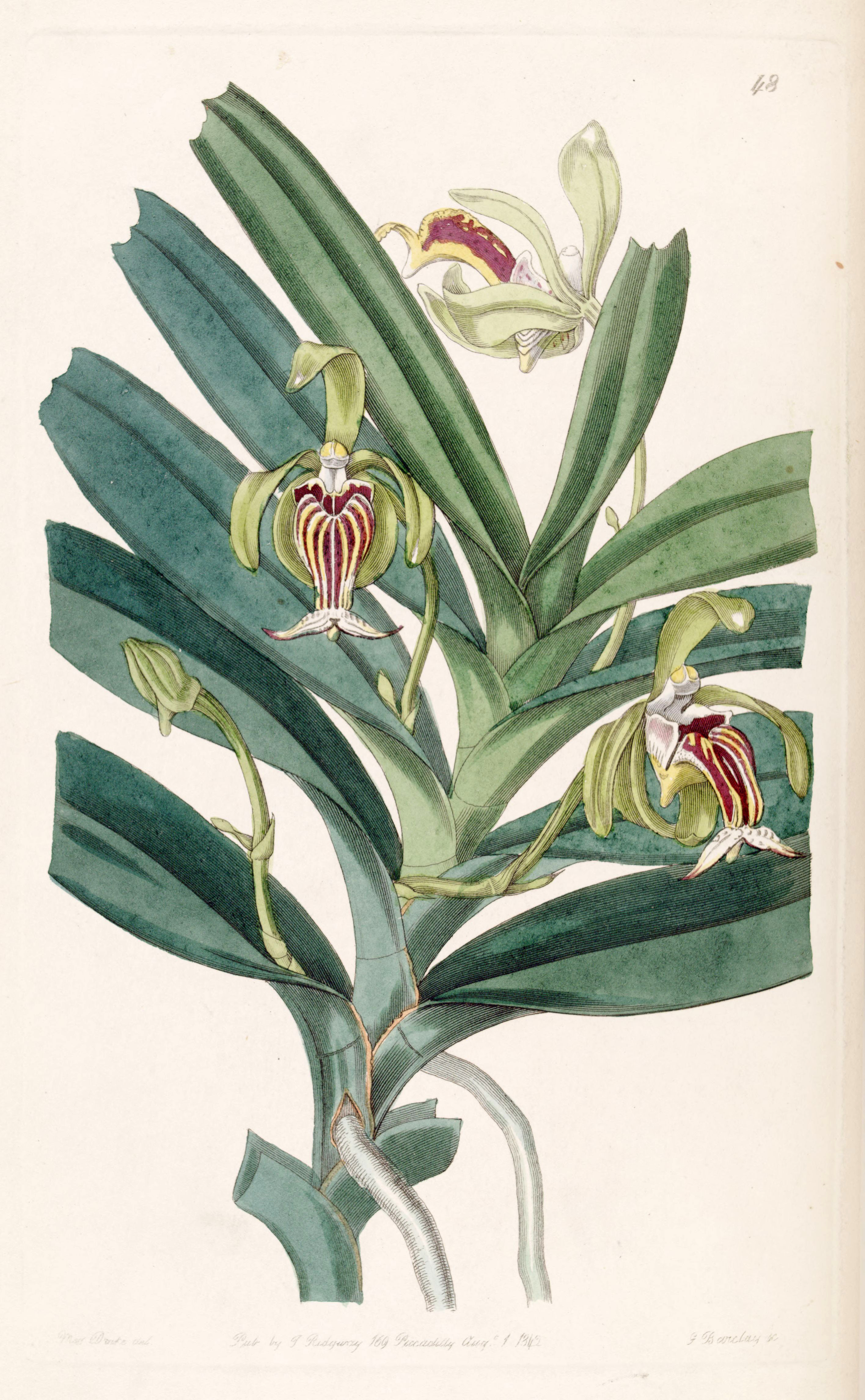 Vanda cristata